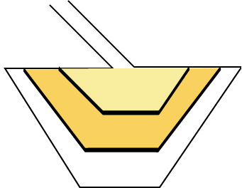 河口の体積の模様